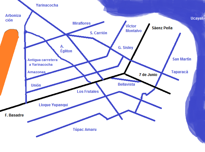 Mapa sobre el cinturón asfáltico de Pucallpa representando las vías raíces (negro) y las derivadas (azul).